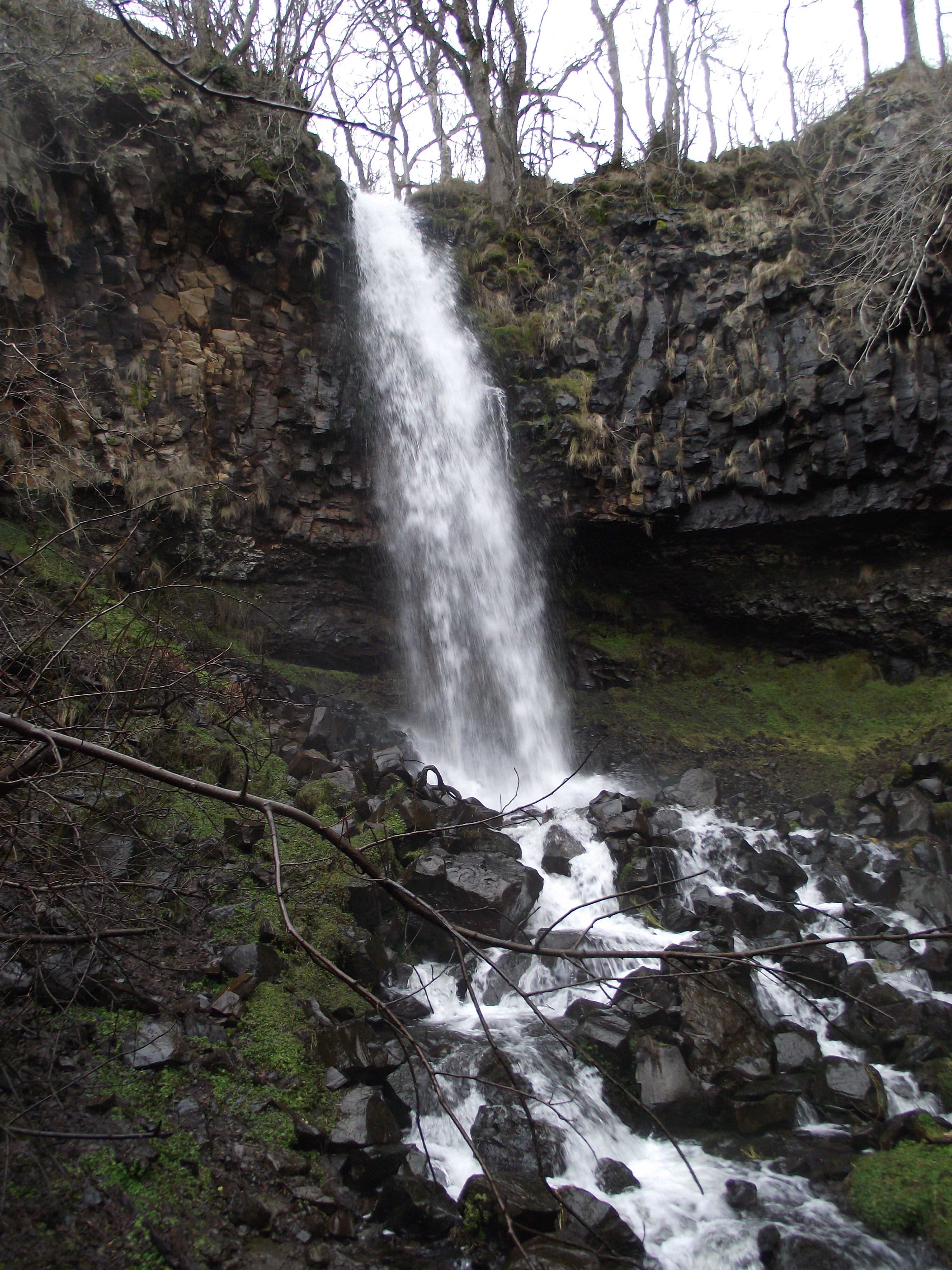 La cascade de Jiou-Jiou non loin de Saint-Urcize (Cantal).